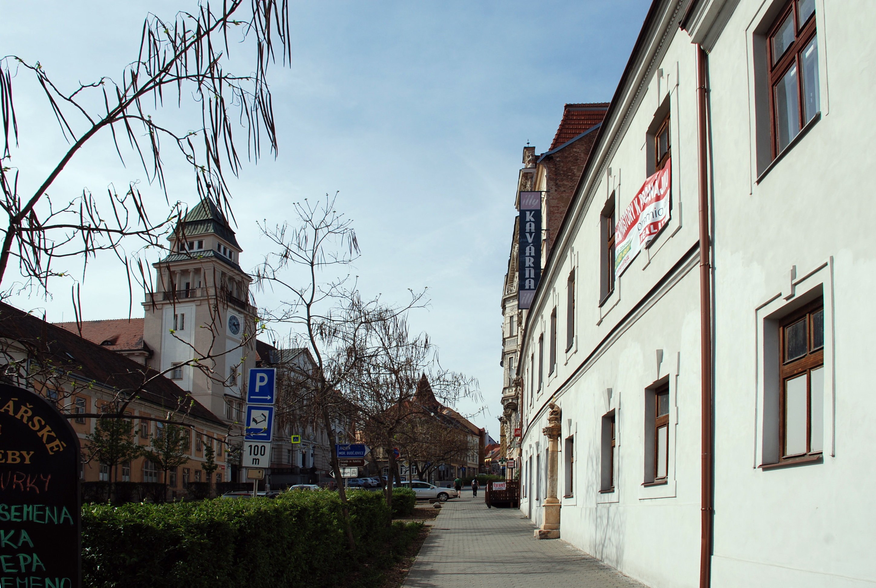 Znojmo, Straßenbild (Standort der Herrgottssäule)